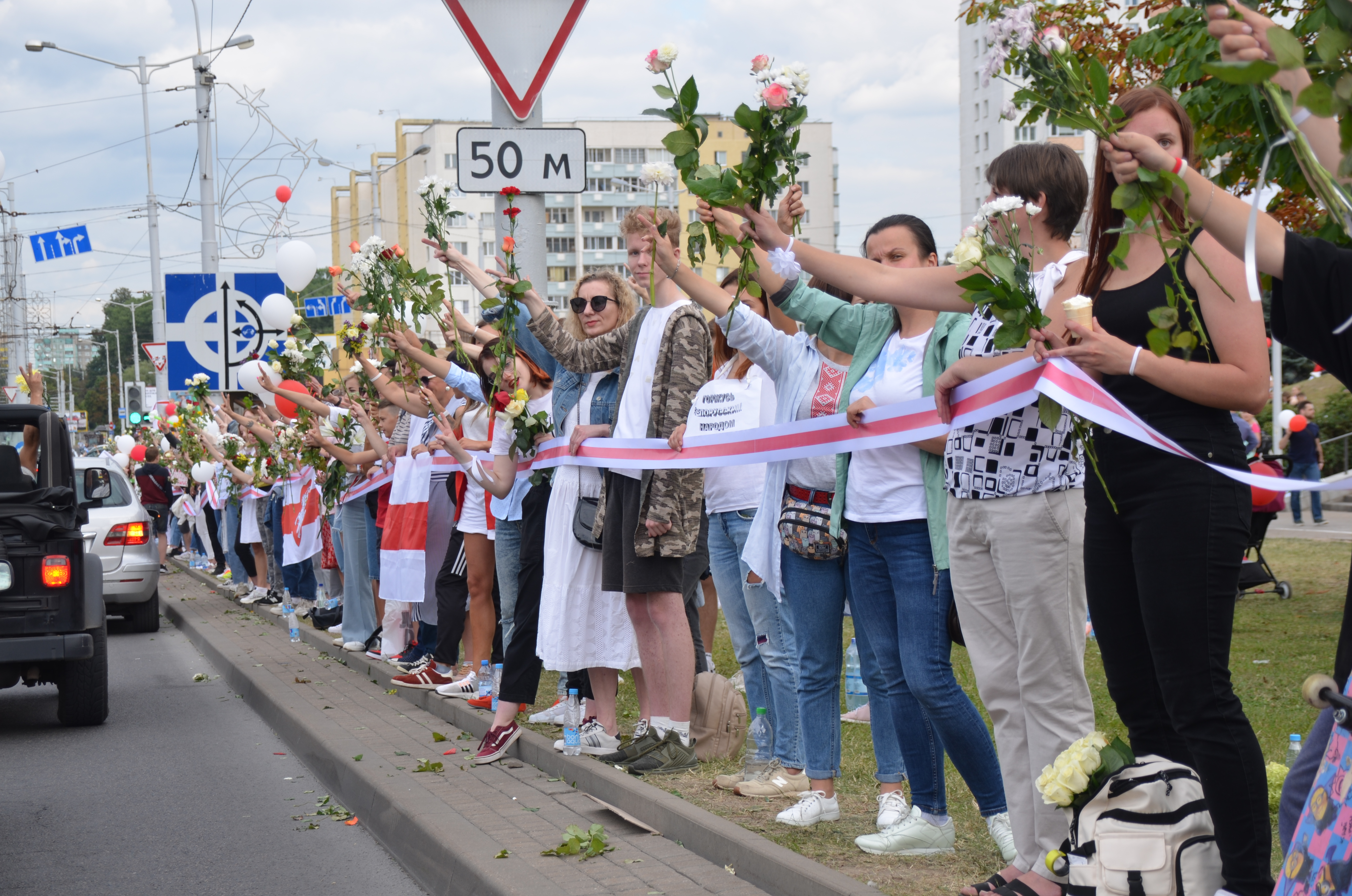 Собрания в Минске вечером 14 августа 2020